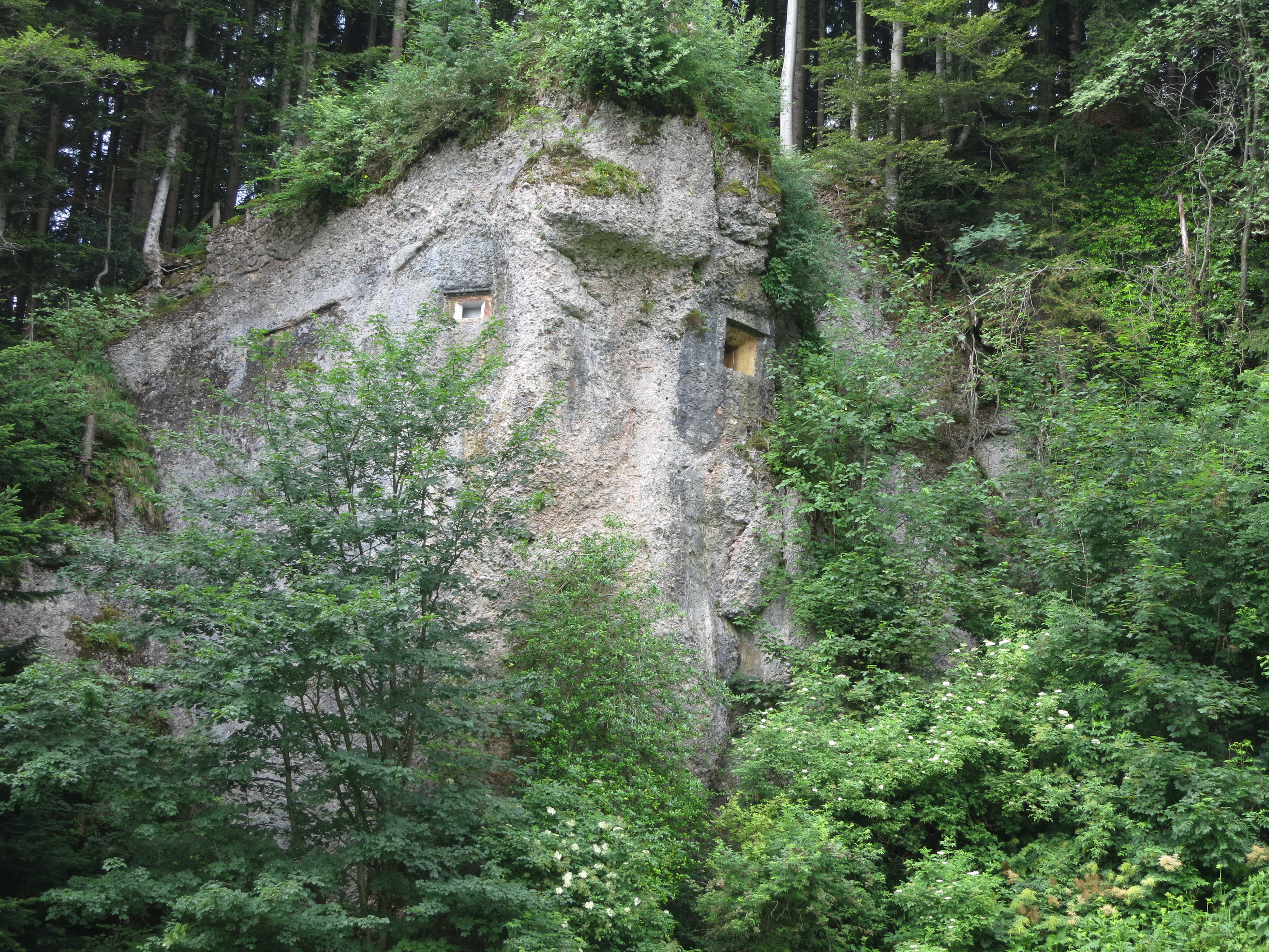 Artilleriwerk Spitz, Sattel, Schweiz